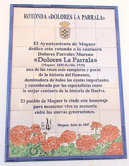 Placa homenaje a La Parrala en recinto ferial de Moguer.